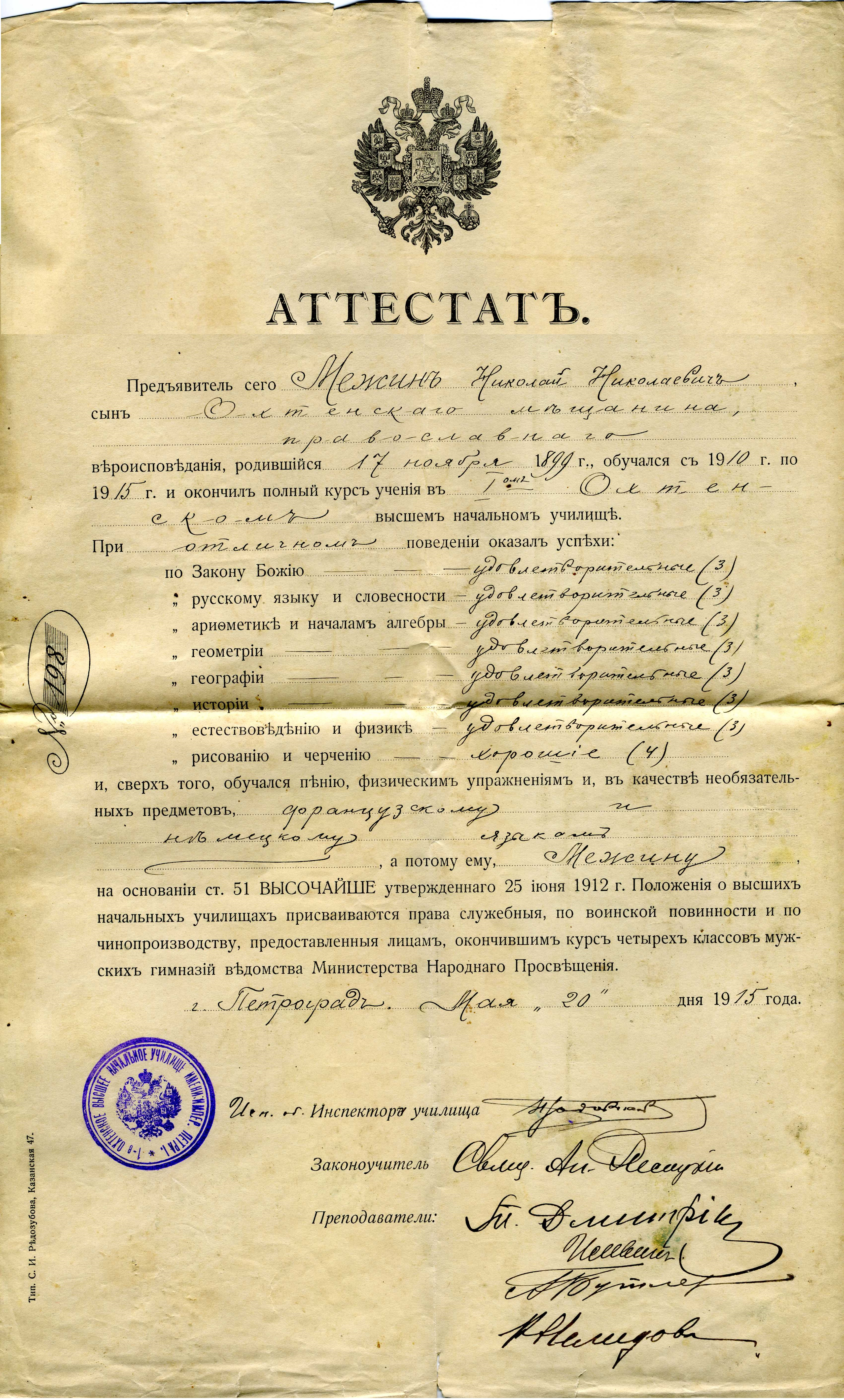 Аттестат об окончании начального училища 1915 год. Из семейного архива Межиных